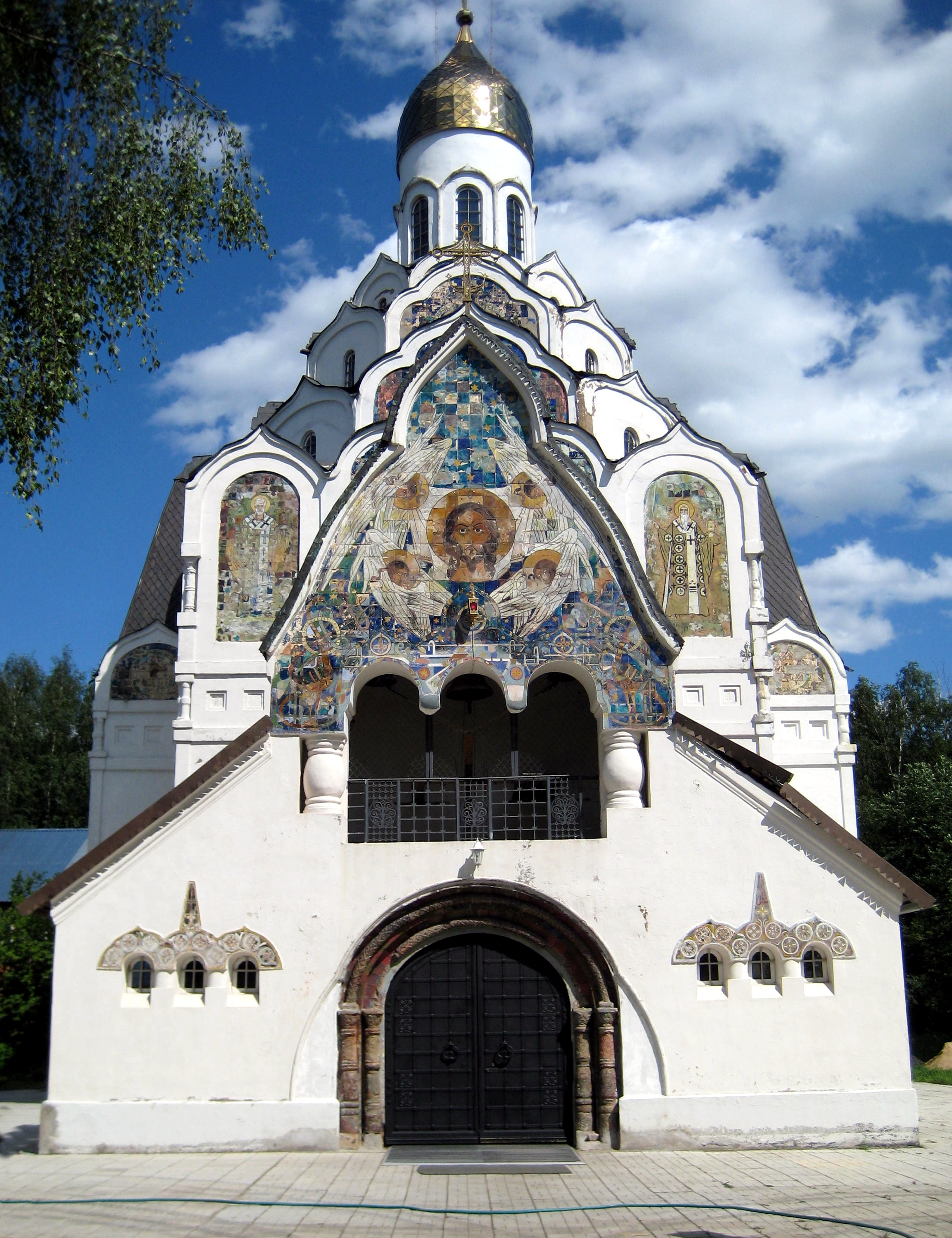 Церковь Спаса Нерукотворного Образа в Клязьме